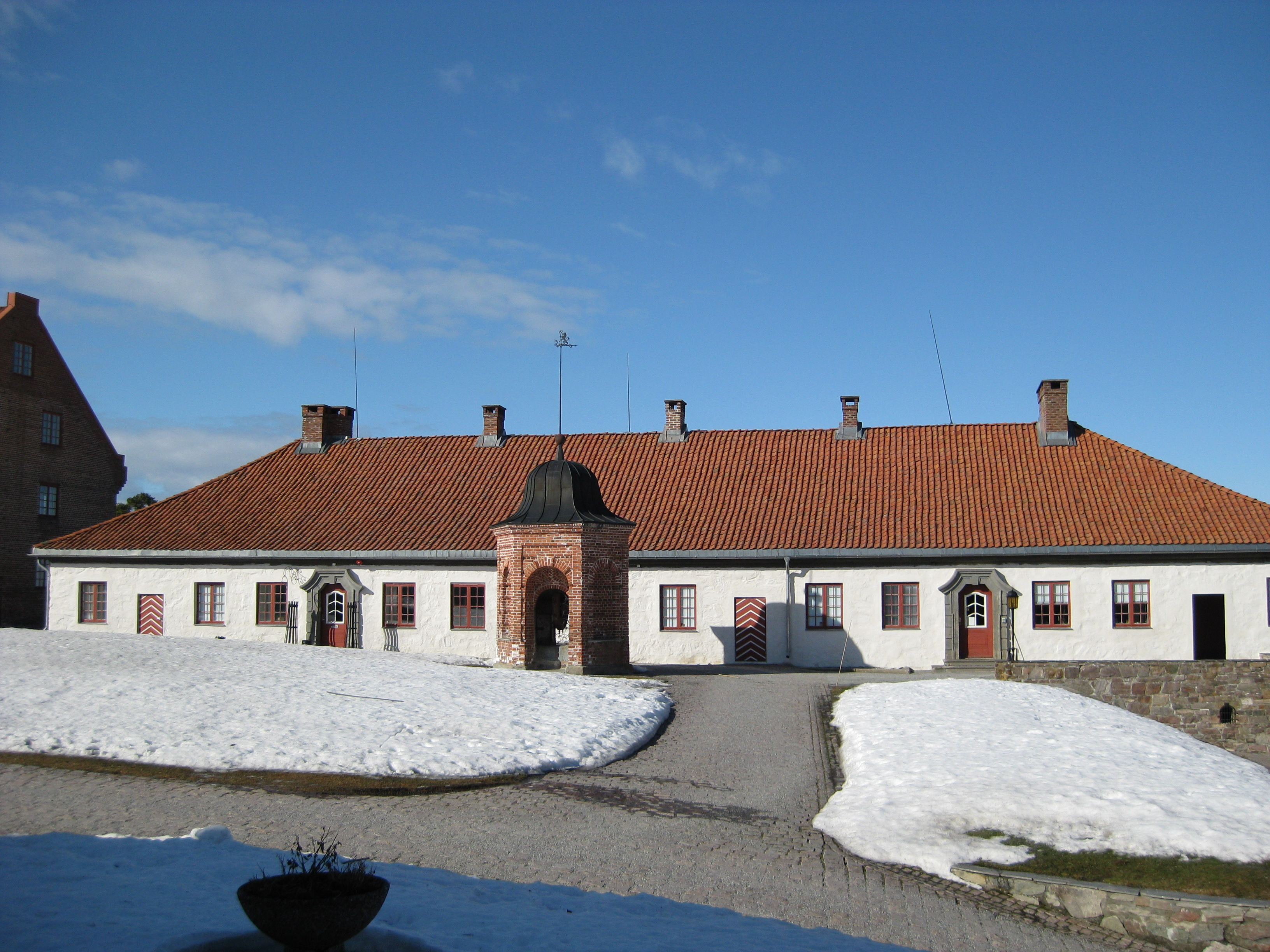 Den gamle Barakke (1702) samt hovedbrønnen i forkant ved Kongsvinger festning